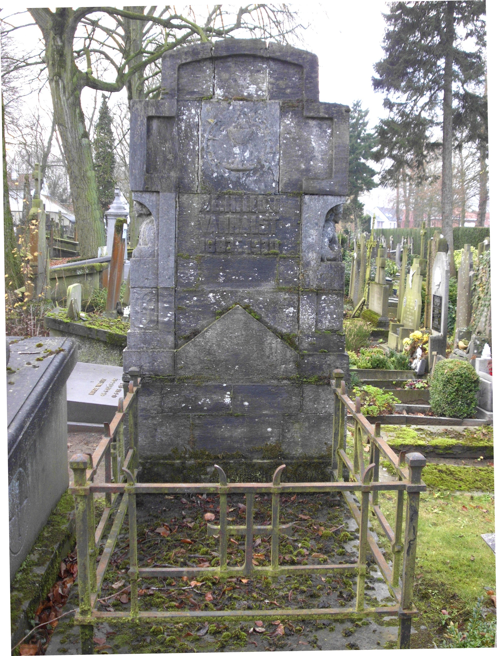 Grafsteen van Leo Vanhalst (1883-1930), medegrondlegger van het Vrij Technisch Instituut Brugge, op de Centrale Begraafplaats (Brugge) (vak12, naast het graf van Guido Gezelle).